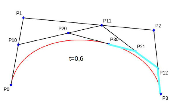 Podela Bezijerove krive na dva dela.